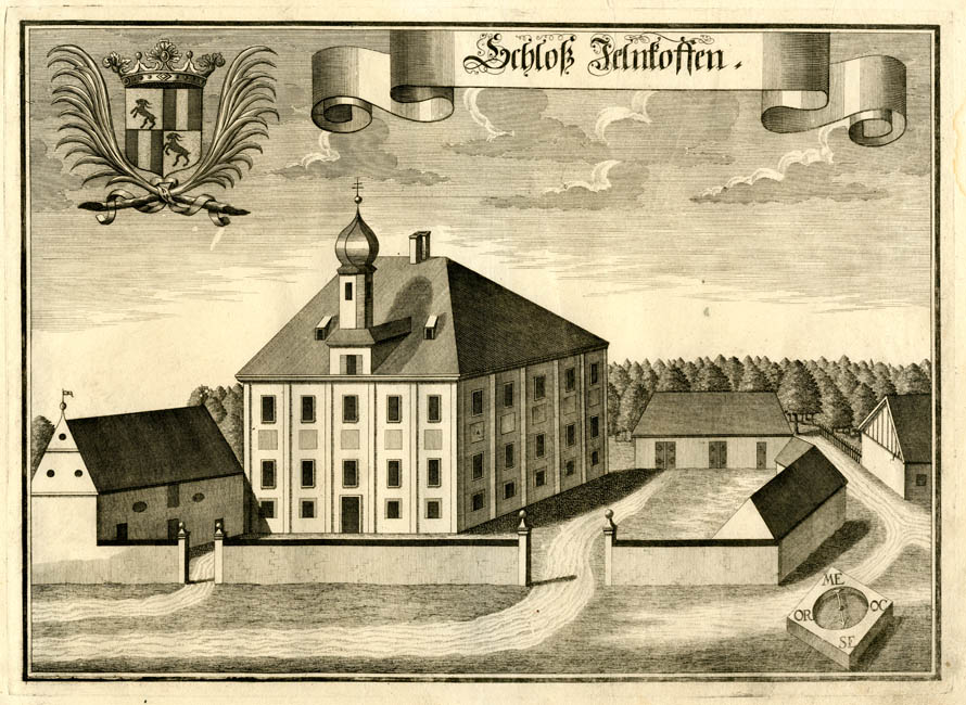 “Schloß Jelnkoffen.” (Jellenkofen bei Ergoldsbach), aus : Beschreibung des Churfürsten- und Hertzogthumbs Ober- und Nidern Bayrn. – Rentamt Landshut., 1723